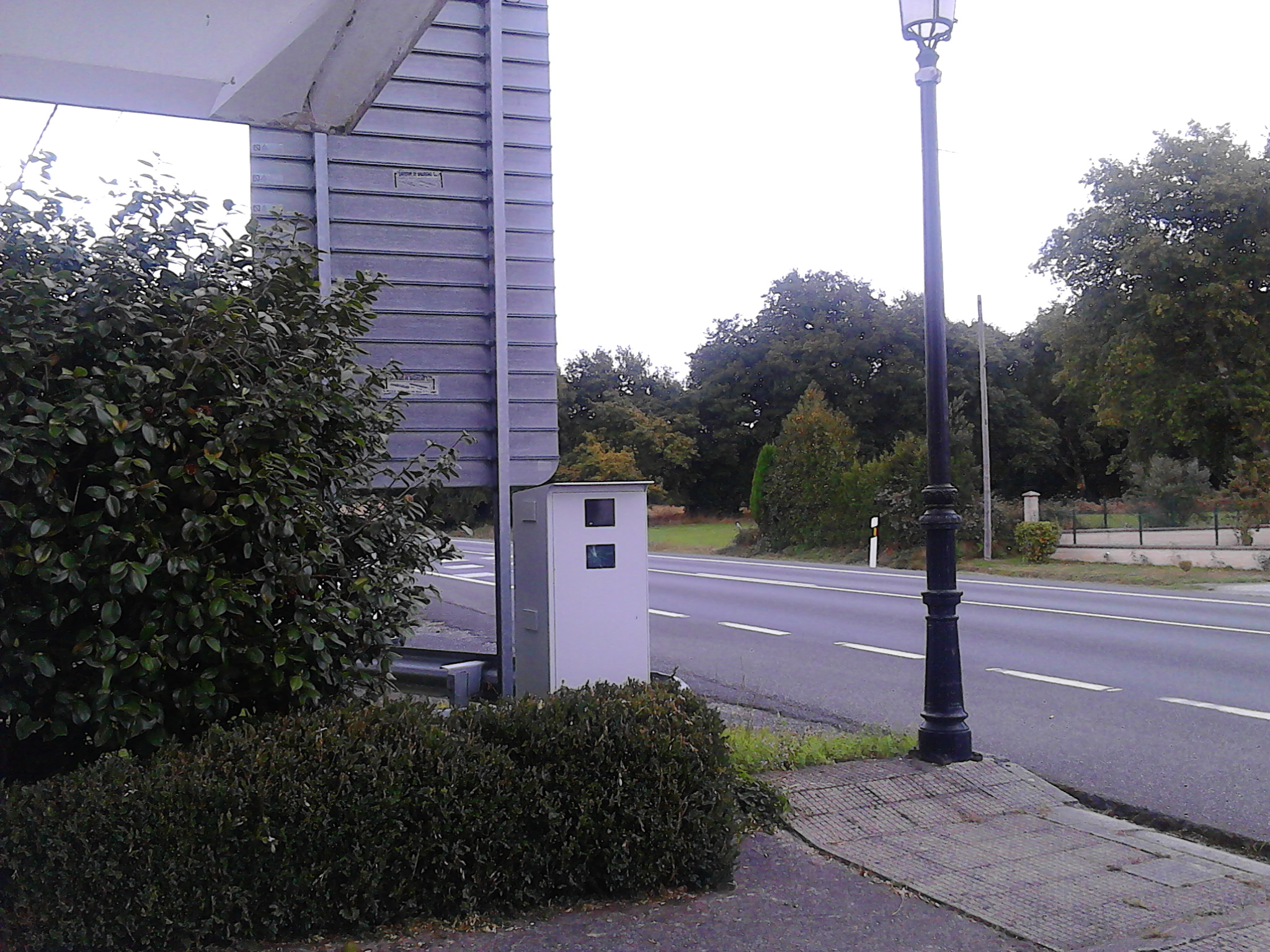 Radar de estrada no Marquiño (Lardeiros, O Pino), na estrada N-634